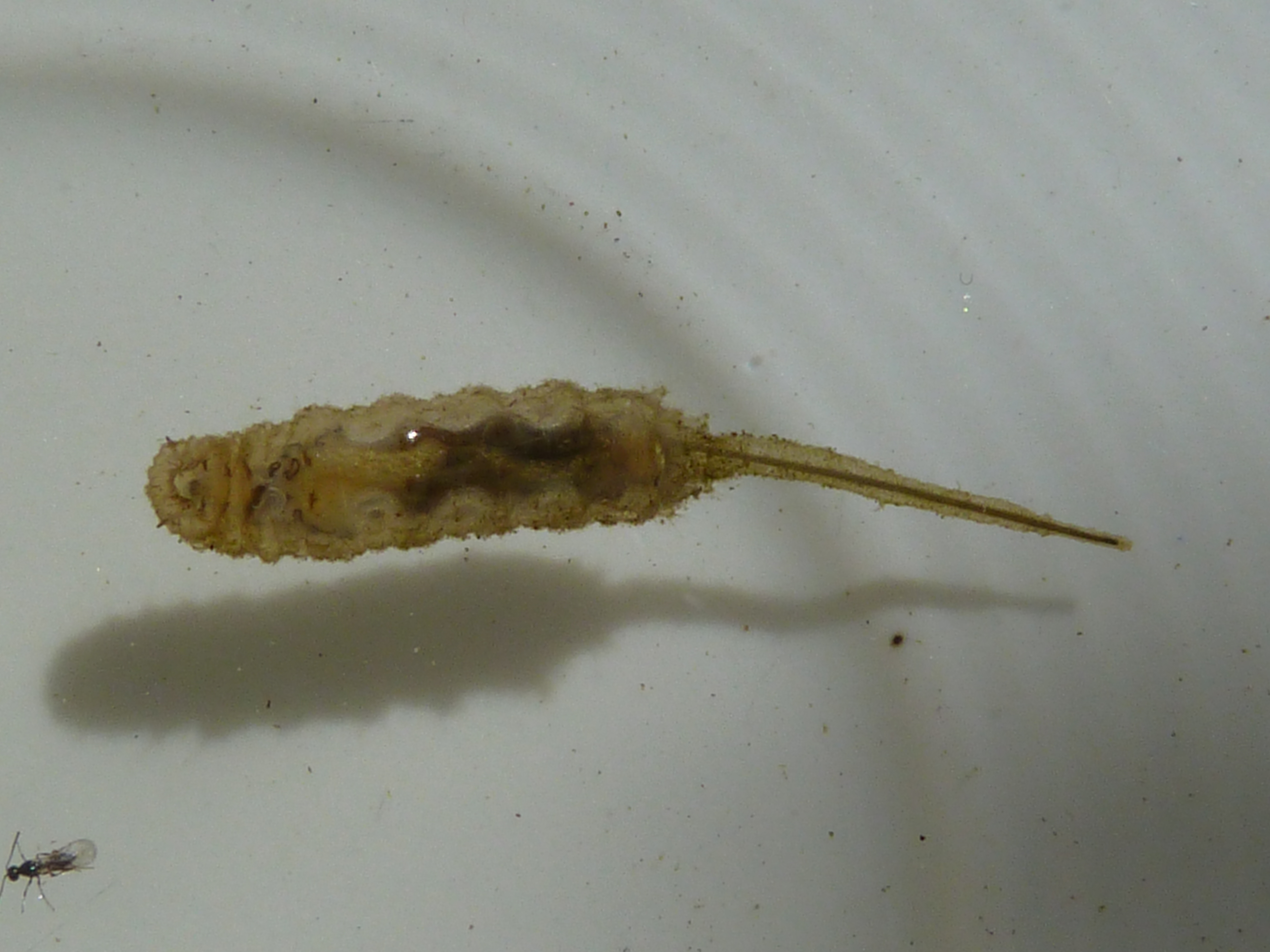 Rattenschwanzlarve evtl. der Mistbiene, zur Bestimmung auf WP:RBIO/B